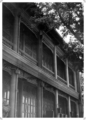 书院被毁前完整照片